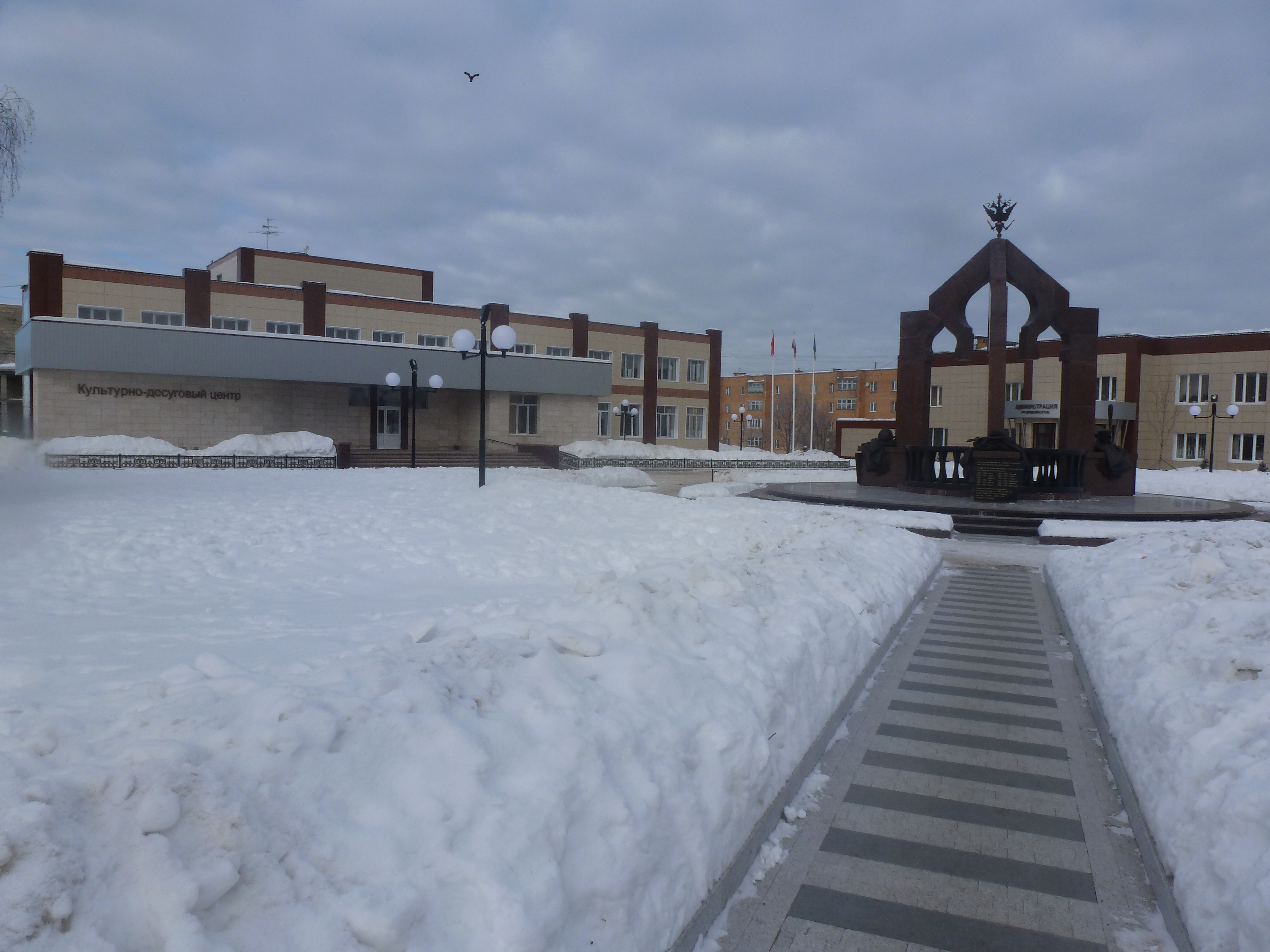 Placo apud la loka estrarejo de Jerŝovo